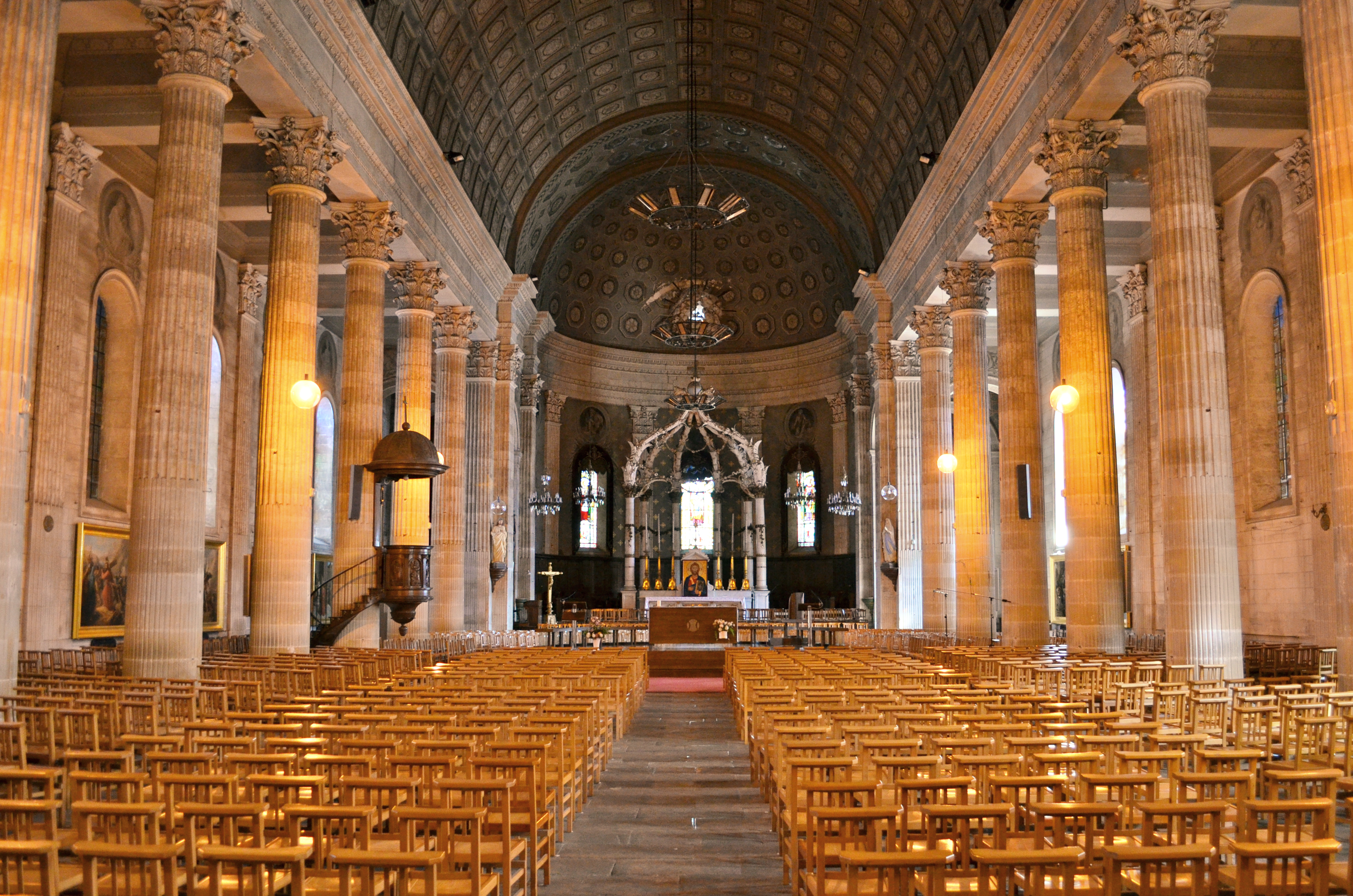 Église Saint-Louis, construite entre 1813 et 1830 - La Roche-sur-Yon .